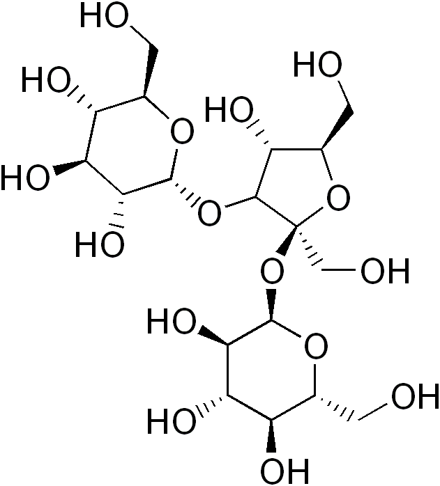 chemical structure of melezitose